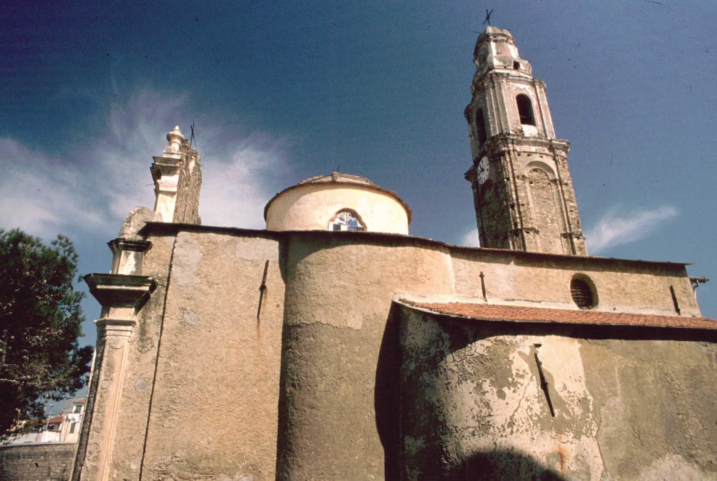 Celso Mosca, S.Lorenzo al mare, panorama